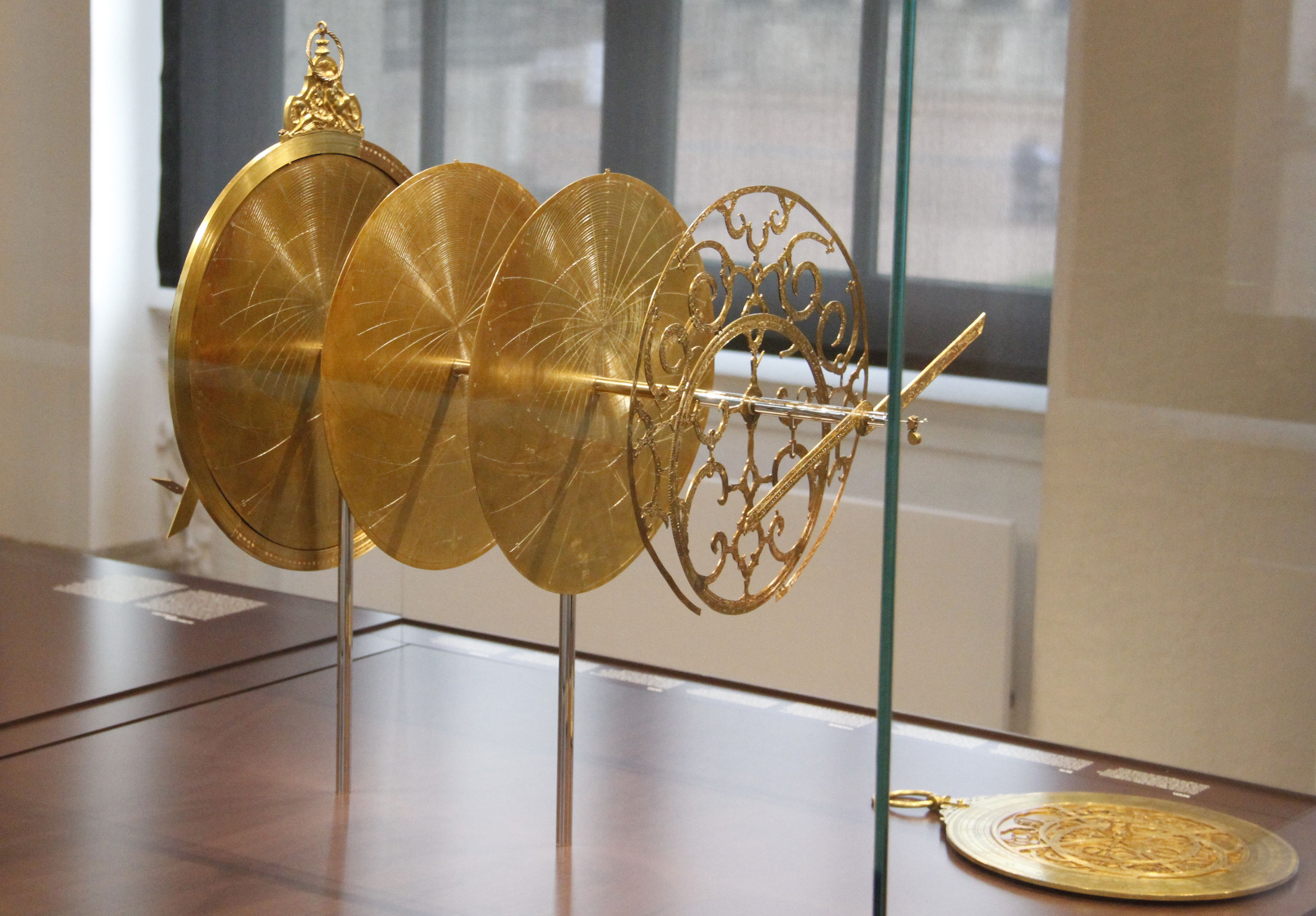 Eine Explosionsdarstellung eines Astrolabiums